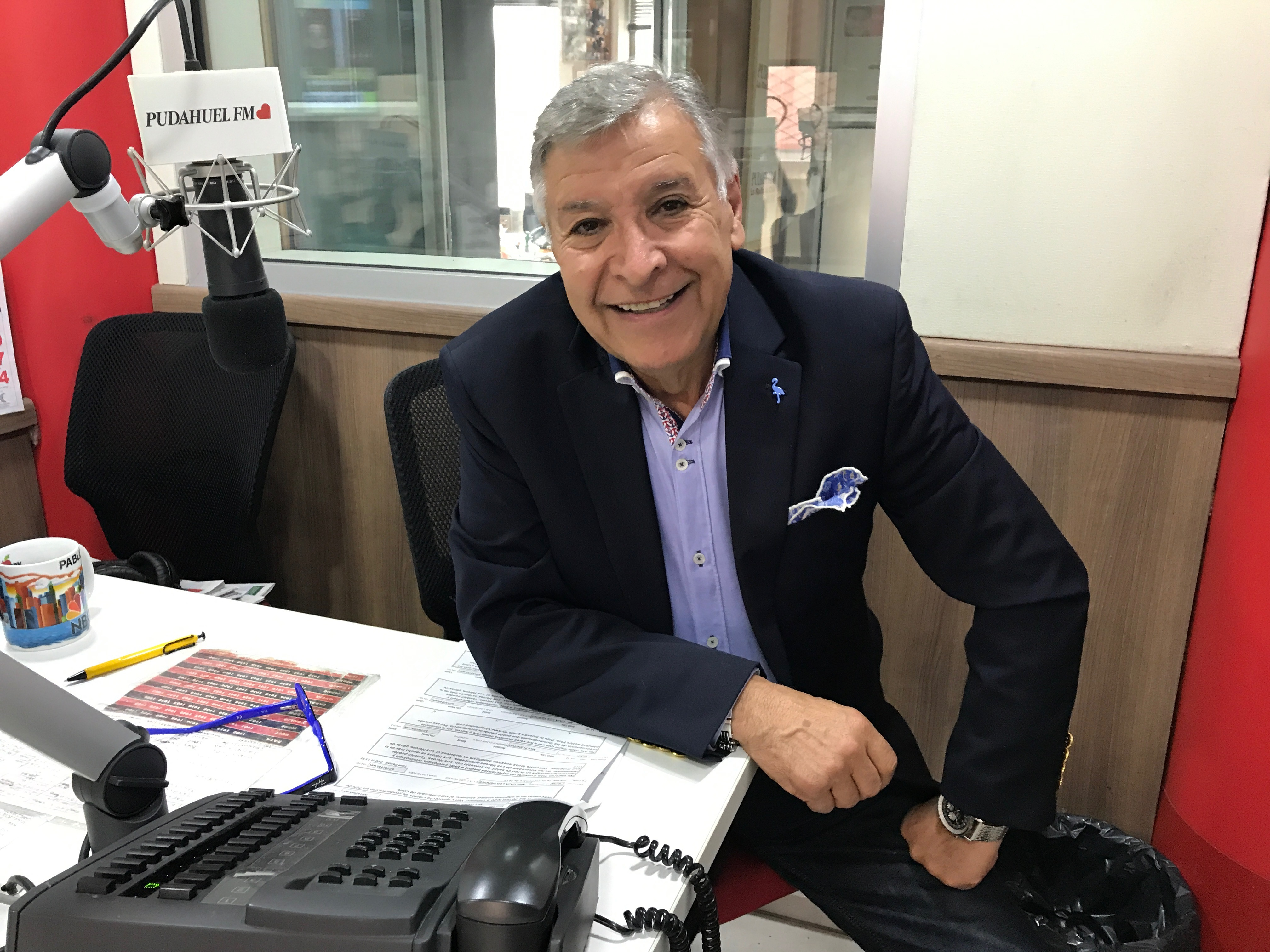 Pablito